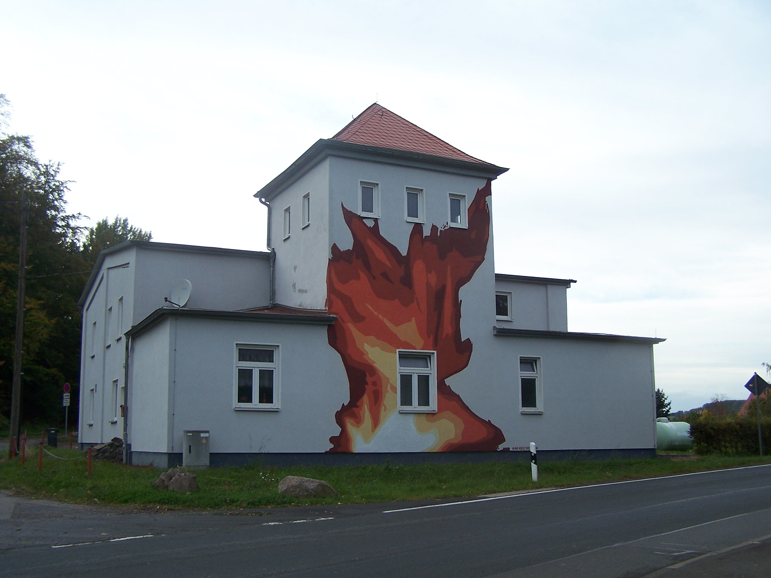 Bad Liebenstein